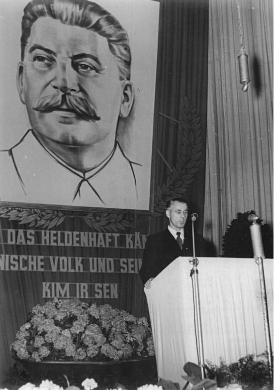 Berlin, Festakt zum Nationalfeiertag der VR Korea, Willi Stoph Zentralbild Schmidtke 15.8.1952 Zum Nationalen Feiertag der Volksrepublik Korea. fand am 15. August 1952 im Filmtheater Babylon, Berlin, ein Festakt statt. Es sprach der Minister des Innern, Willi Stoph. Im Kulturprogramm wirkten koreanische Volkskünstler mit. UBz: Minister Willi Stoph bei seiner Ansprache. Stalin Gesperrt